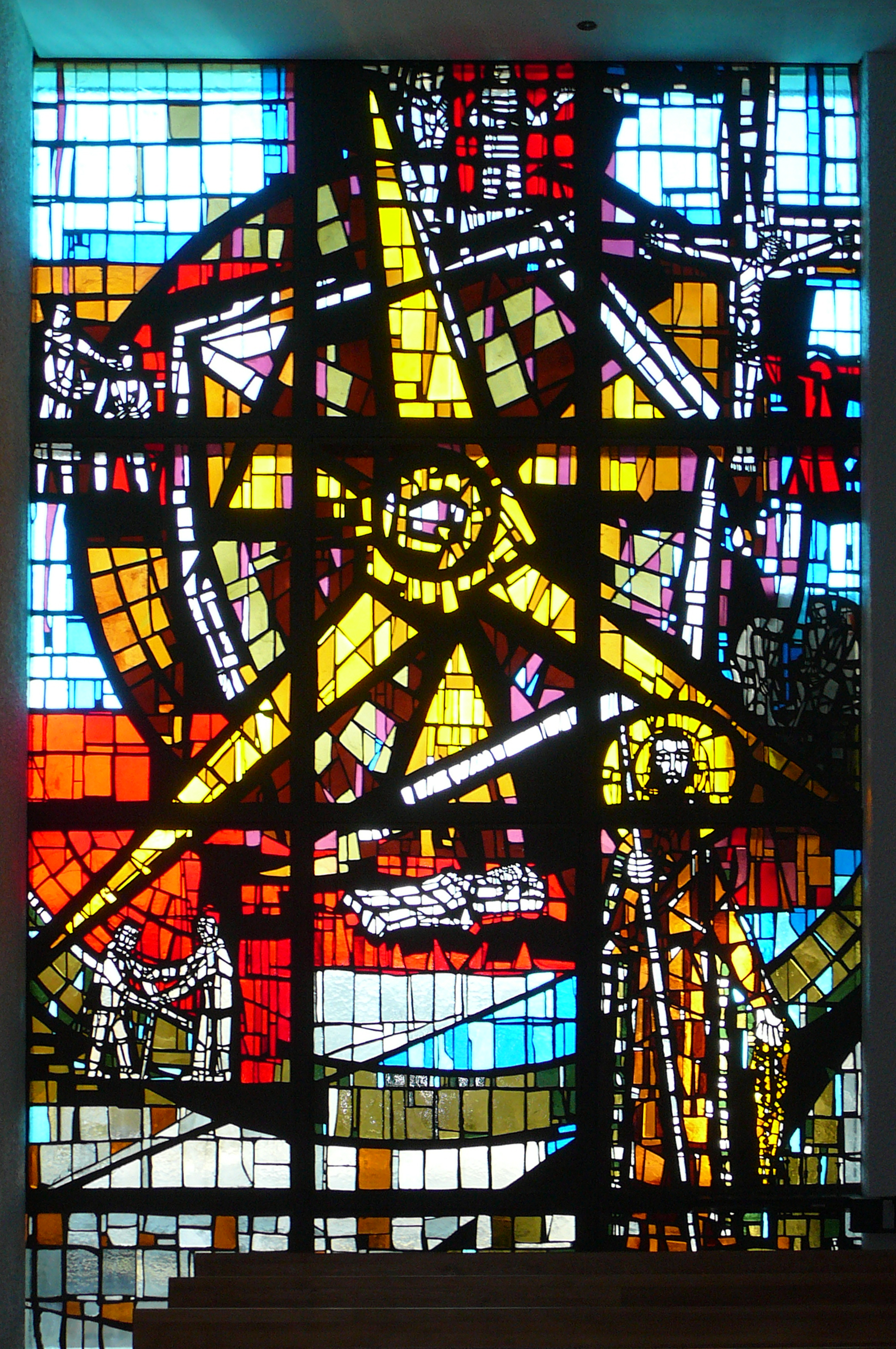 Römisch-katholische Pfarrkirche Bruder Klaus Urdorf, Betonglasfenster von Peter (Piero) Travaglini